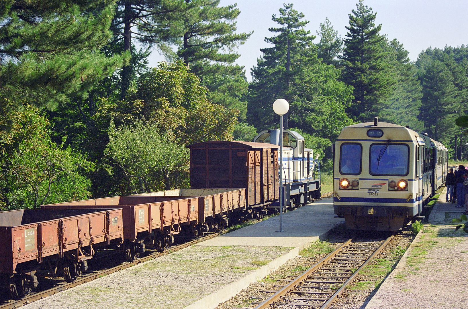 Croisement entre un train de voyageurs Bastia-Ajaccio et le train de marchandises Ajaccio-Bastia , en gare de Vizzavona le 18 août 2000.